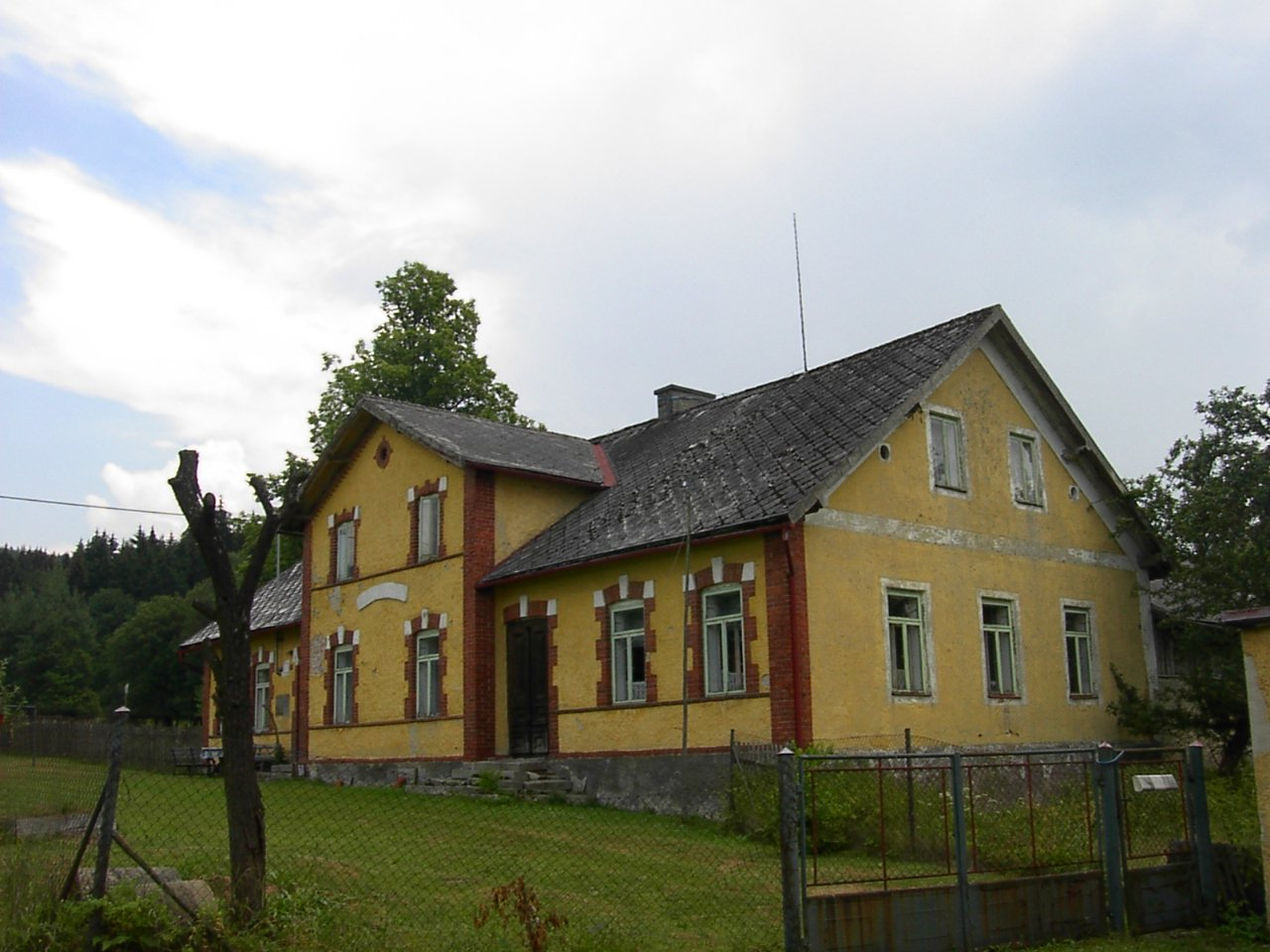 Původně plánované nádraží v Nemanicích..